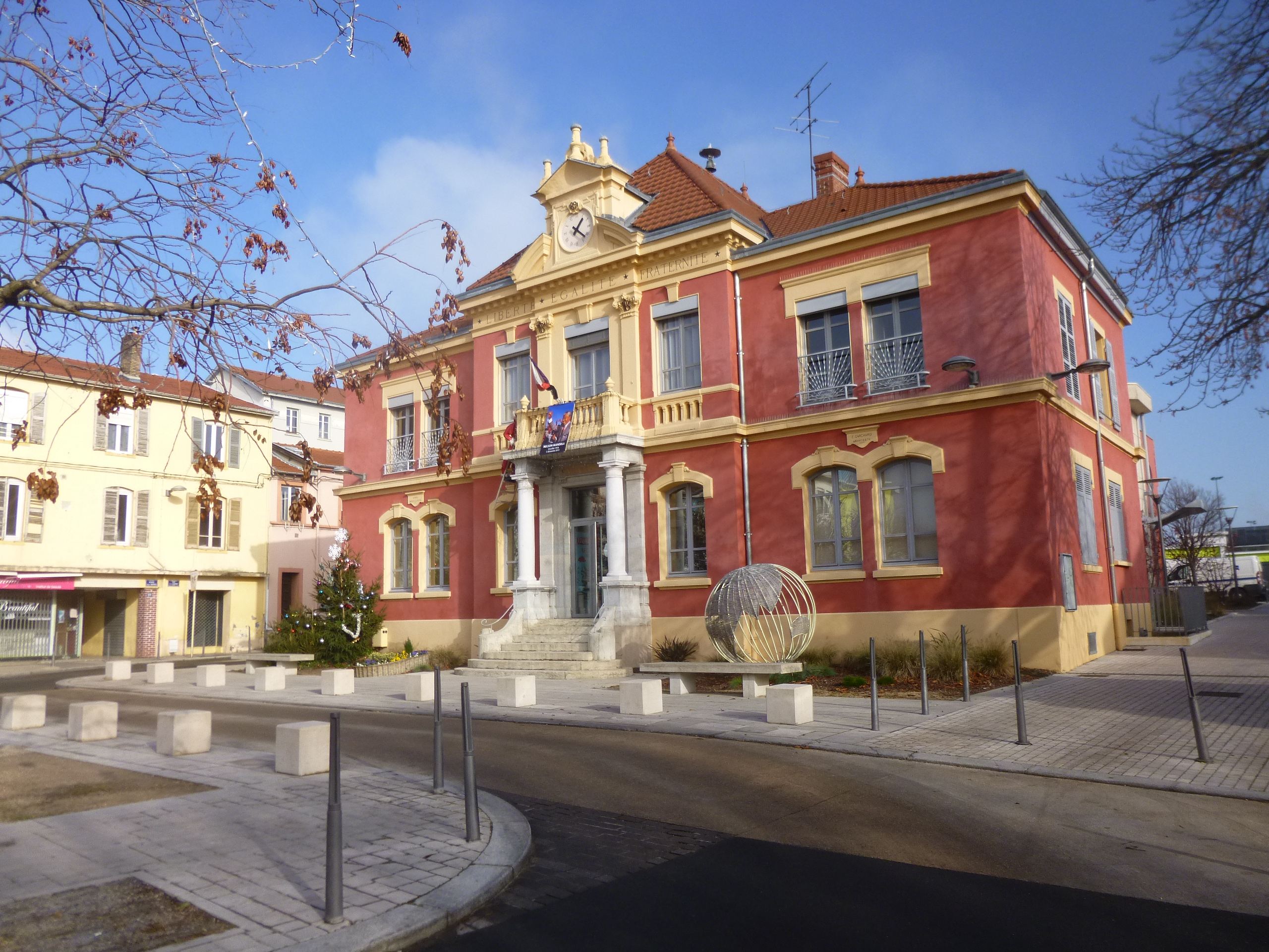 La mairie de Pierre-Bénite